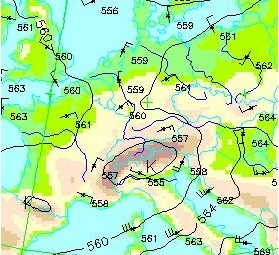 Höhenwetterkarte Retop 500/1000 hPa (beispielhaft)